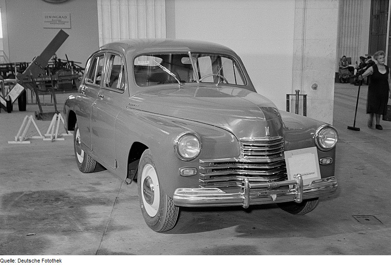 Original image description from the Deutsche Fotothek PKW sowjetischer Produktion auf der Leipziger Herbstmesse 1954